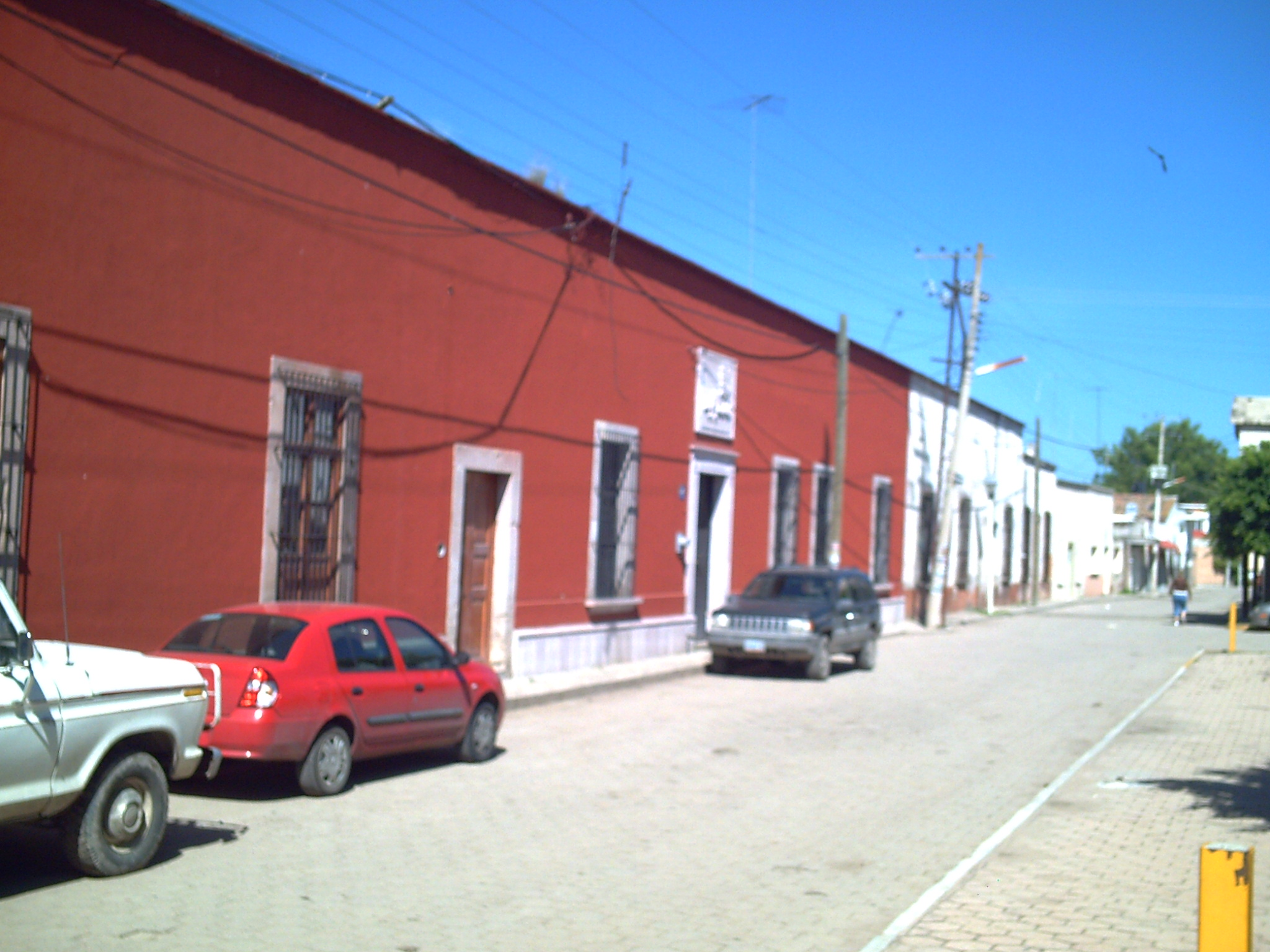 Calle principal de Jalpa de Cánovas